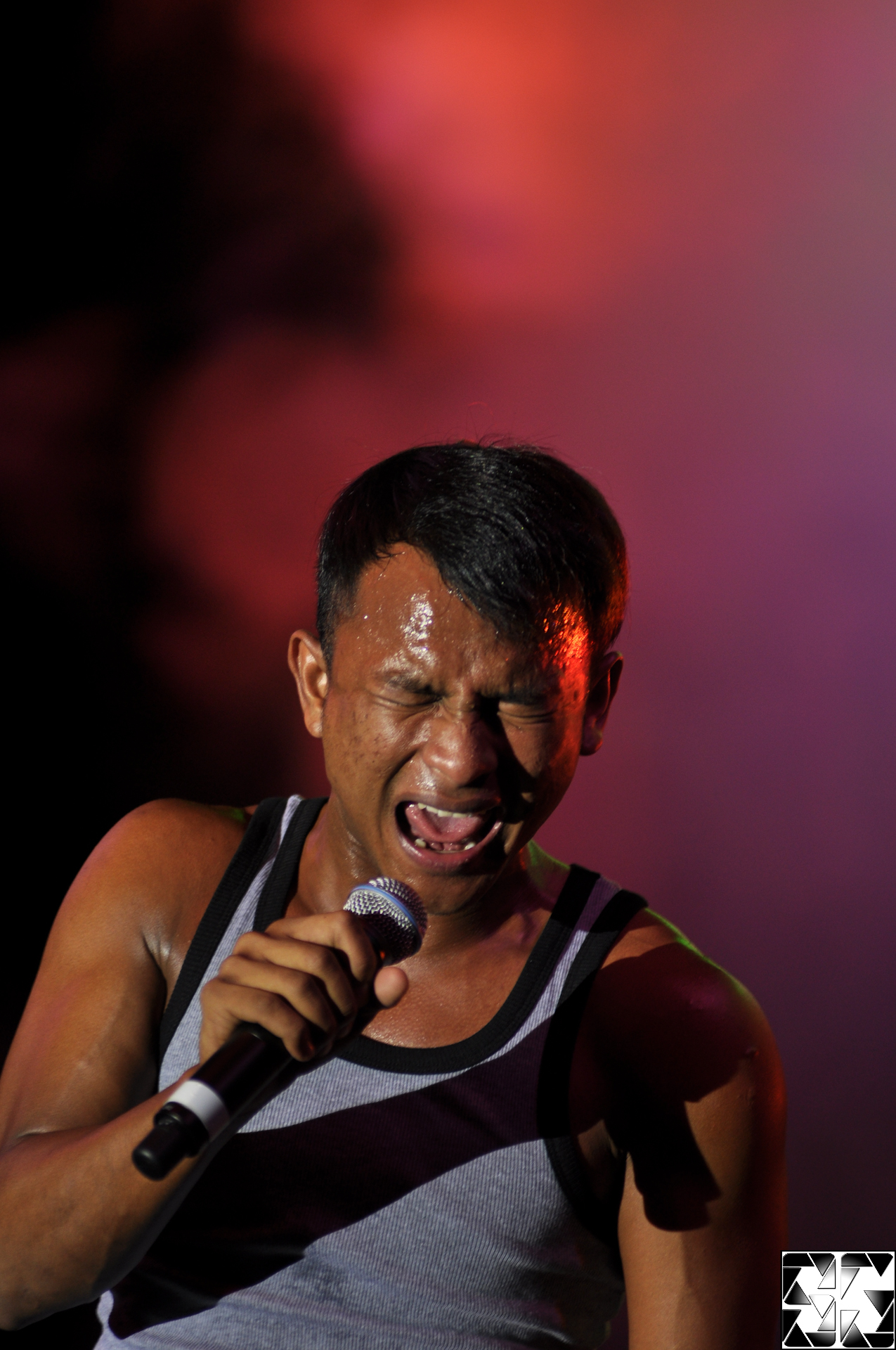 Black Hanifah di Konsert Twisties Bingit 2010